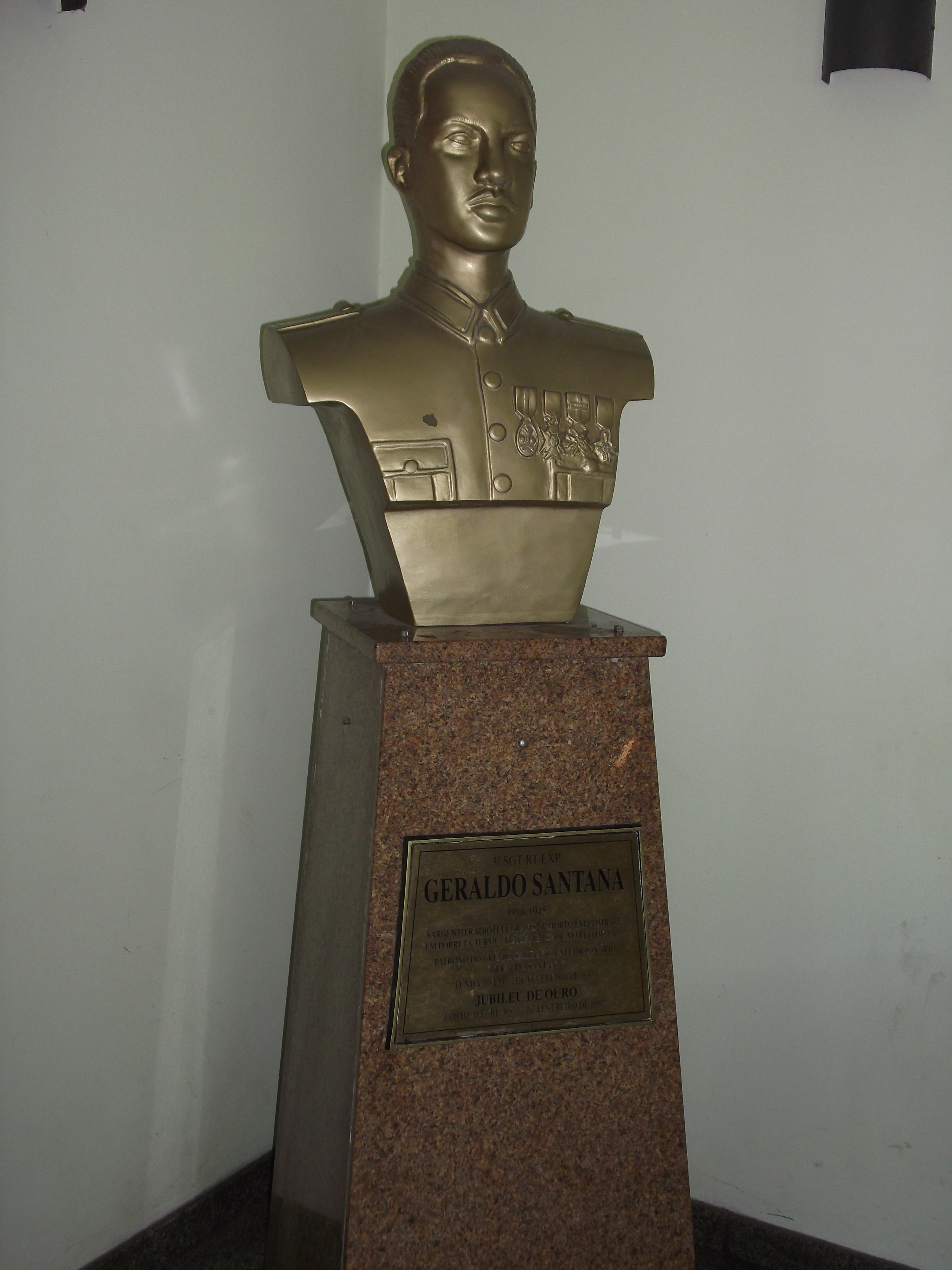 Sargento Expedicionário Geraldo Santana